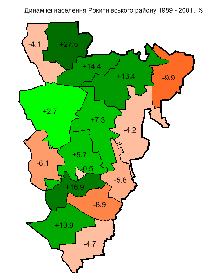 Динаміка населення Рокитнівського району за 1989 - 2001 рр. / Population dynamics of Rokytne raion,1989-2001